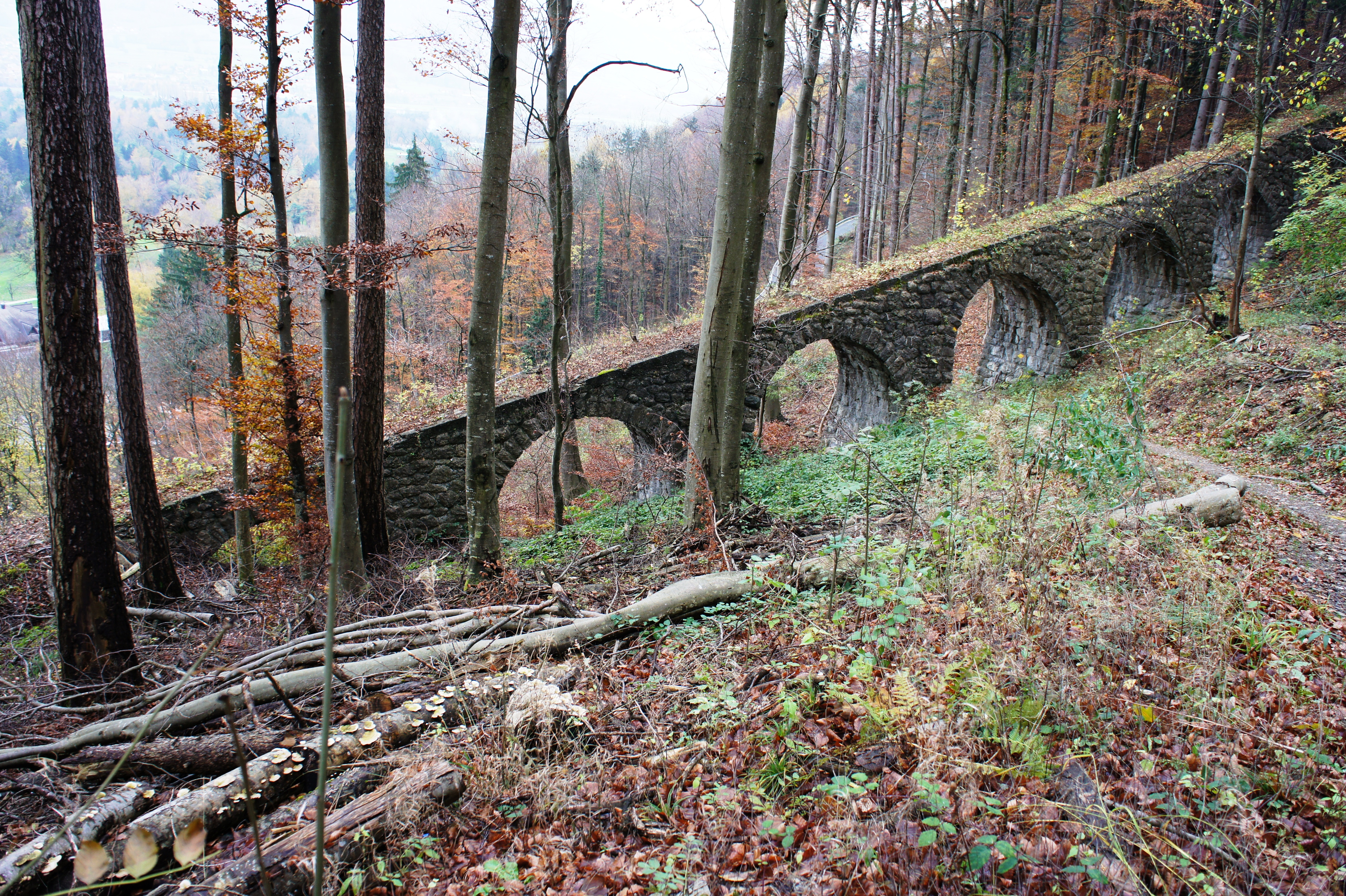 Brugg vo de ehemolige Standseilbahn Ragaz–Wartenstein, vo obe.